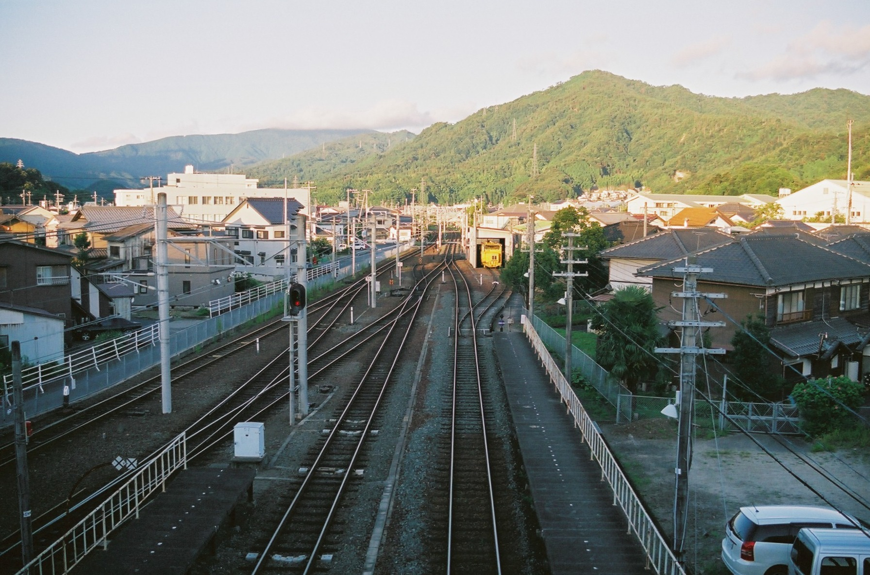 北近畿タンゴ鉄道、宮津駅の豊岡方・福知山方の構内配線